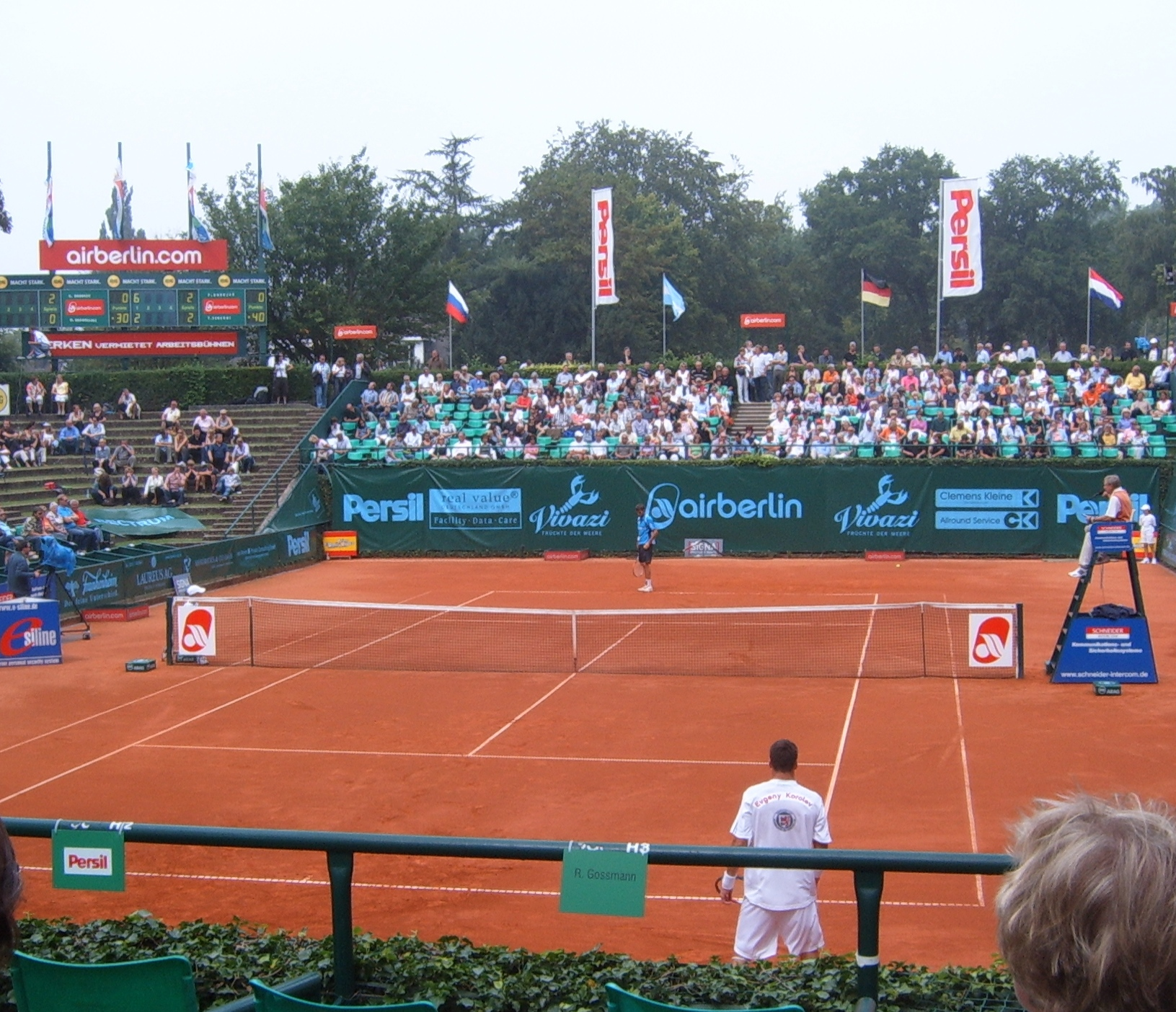 Tennismatch zwischen Marcel Granollers Puyol gegen Evgeny Korolev,während einer Bundesligabegegnung zwischen Düsseldorf und Neuss.